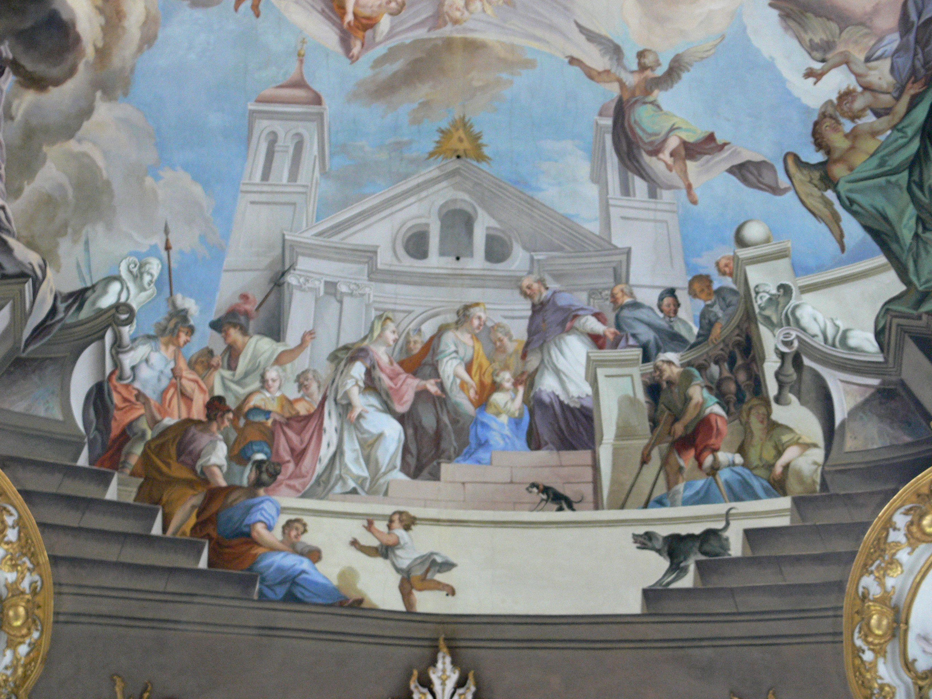 Marienmünster Dießen (ehem. Augustiner-Chorherren-Kirche Mariä Himmelfahrt, heute Pfarrkirche, Dießen am Ammersee) Fresko über dem Langhaus von Johann Georg Bergmüller, 1736: Aufnahme der hl. Mechthildis in das Kloster St. Stephan Johann Georg Bergmüller (1688–1762) DescriptionGerman painter and university teacherDate of birth/death 15 April 1688 2 April 1762Location of birth/death Türkheim AugsburgAuthority control : Q551709 VIAF: 12577533 ISNI: 0000 0001 0777 4090 ULAN: 500006453 LCCN: nr90006283 Open Library: OL913115A WorldCat creator QS:P170,Q551709